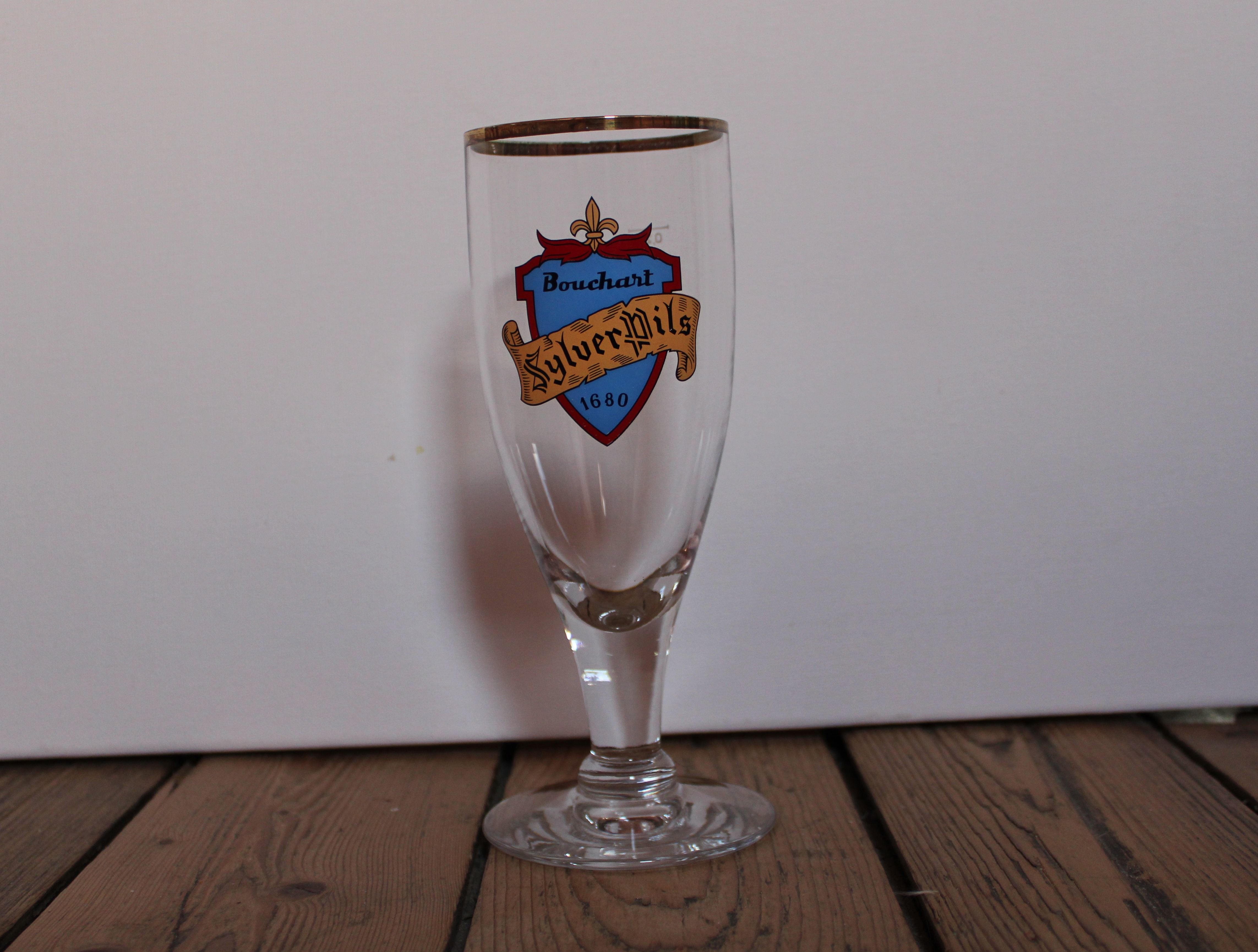 Verre à bière Bouchart Sylver pils 1680